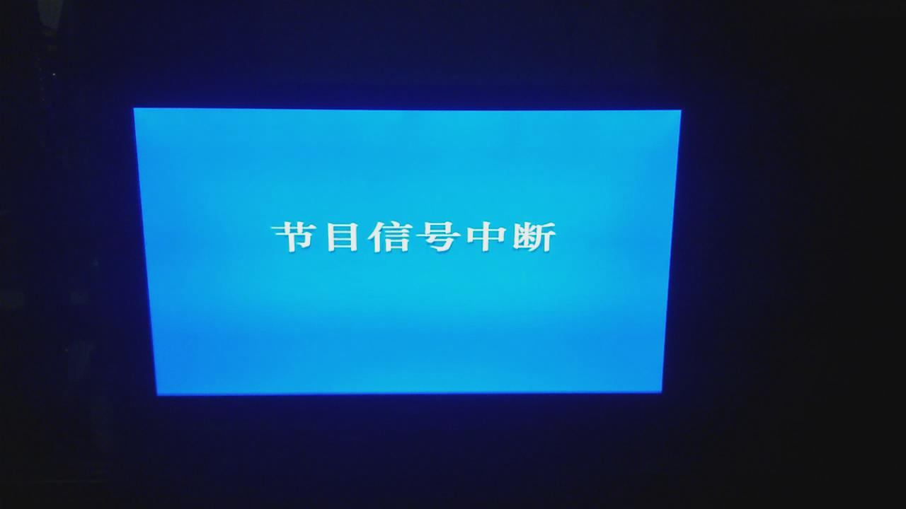 粵語: 2016年4月2號00:08，廣東廣州地區嘅珠江數碼屬下嘅機頂盒，播國際台時變成嘅畫面。